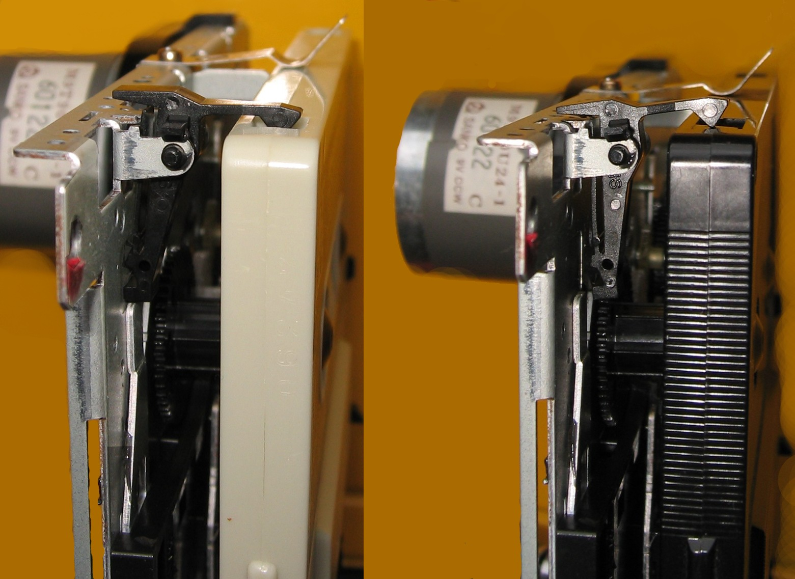 Löschlaschenabtastung an der Compact Cassette